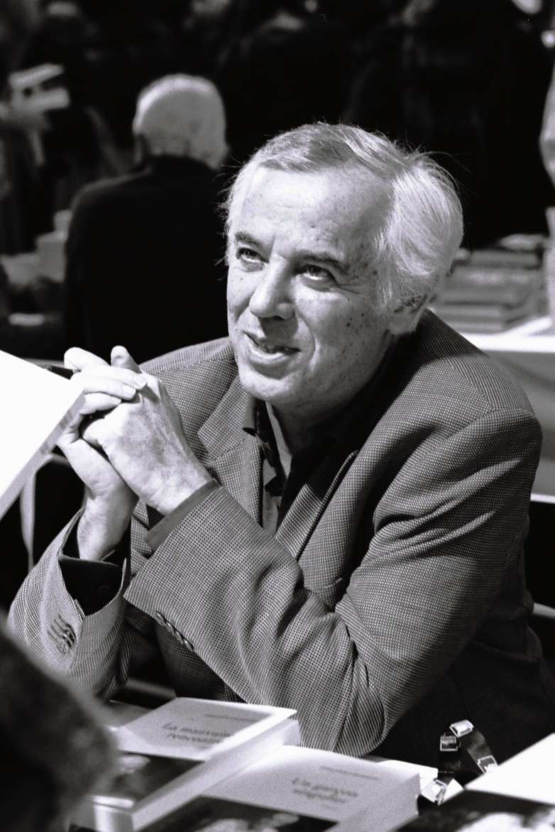 Philippe Grimbert au salon du livre Radio France, 26 novembre 2011